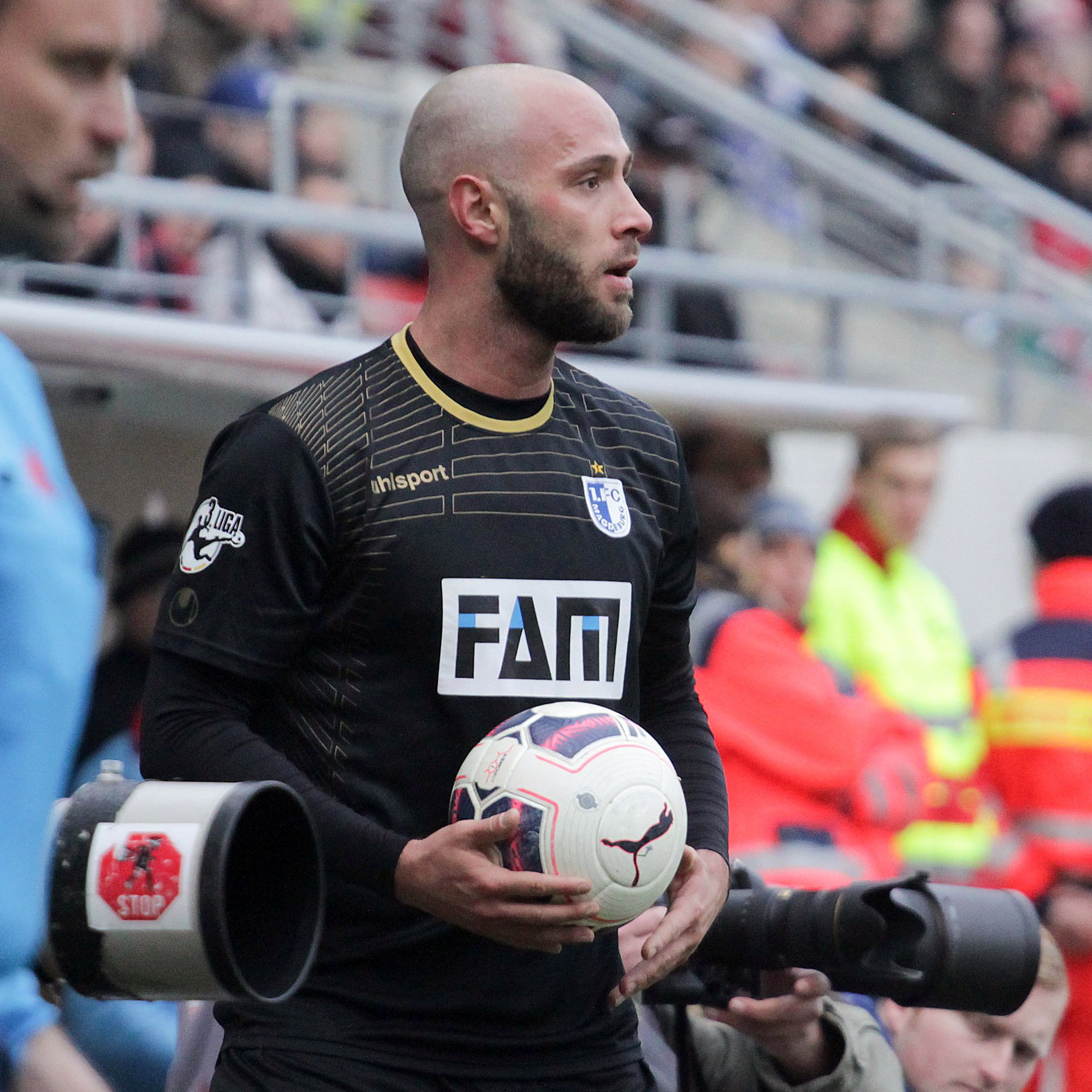 Christopher Handke 2016